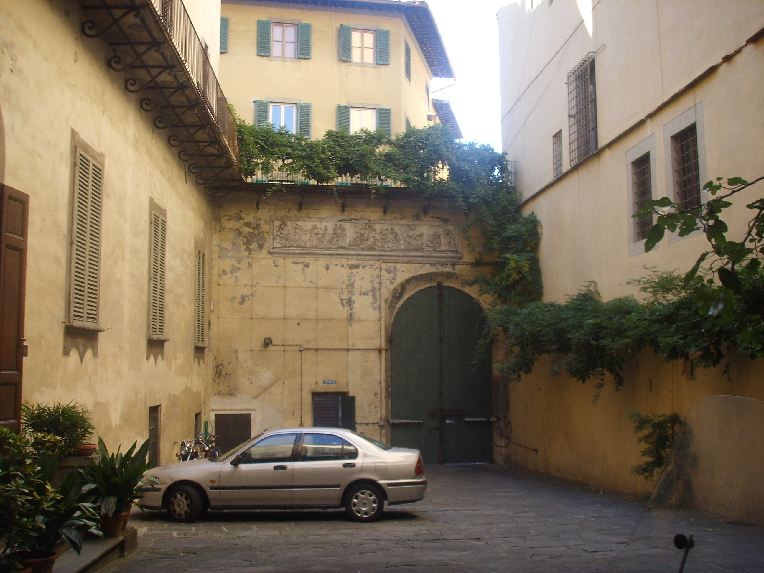 Palazzo degli_alessandri in Florence, italy